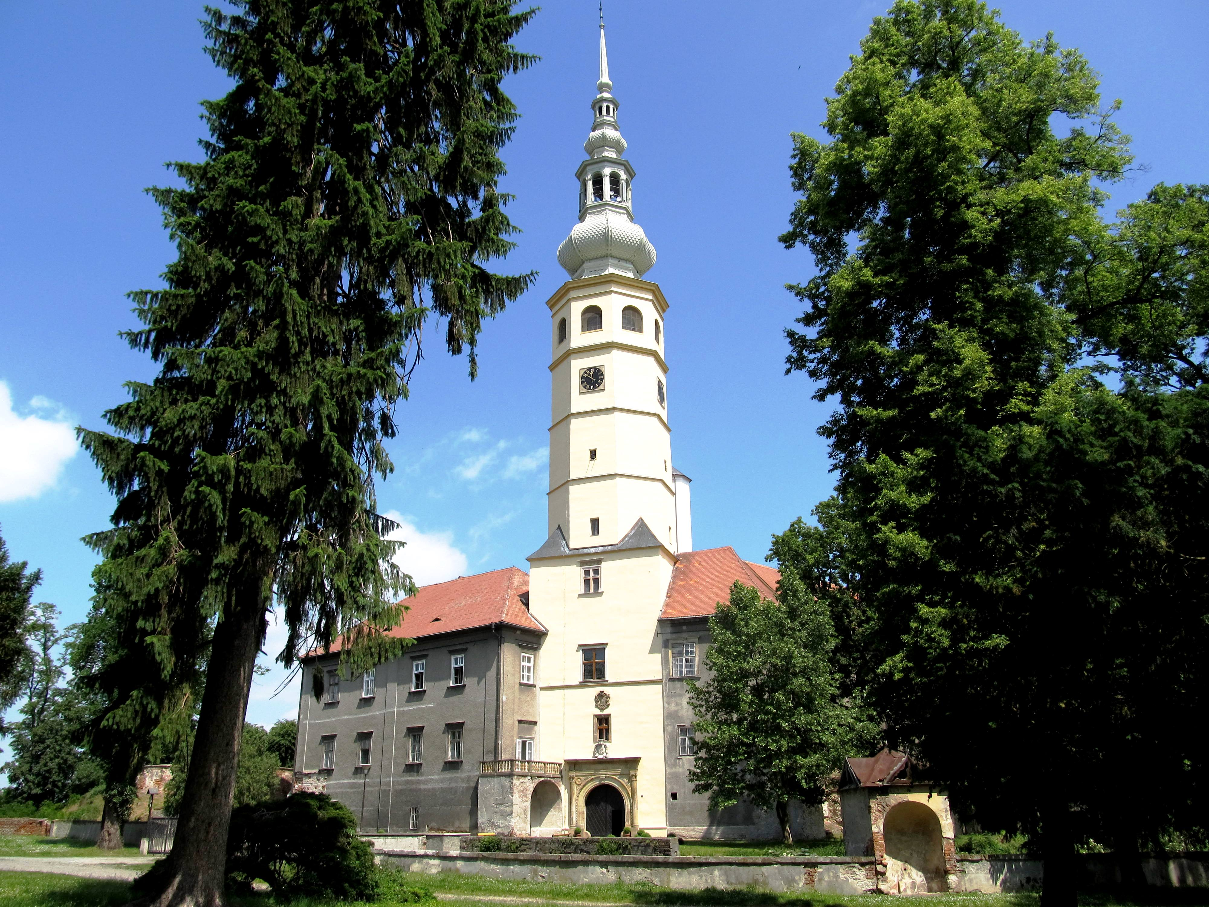 Zámek Tovačov, Spanilá věž